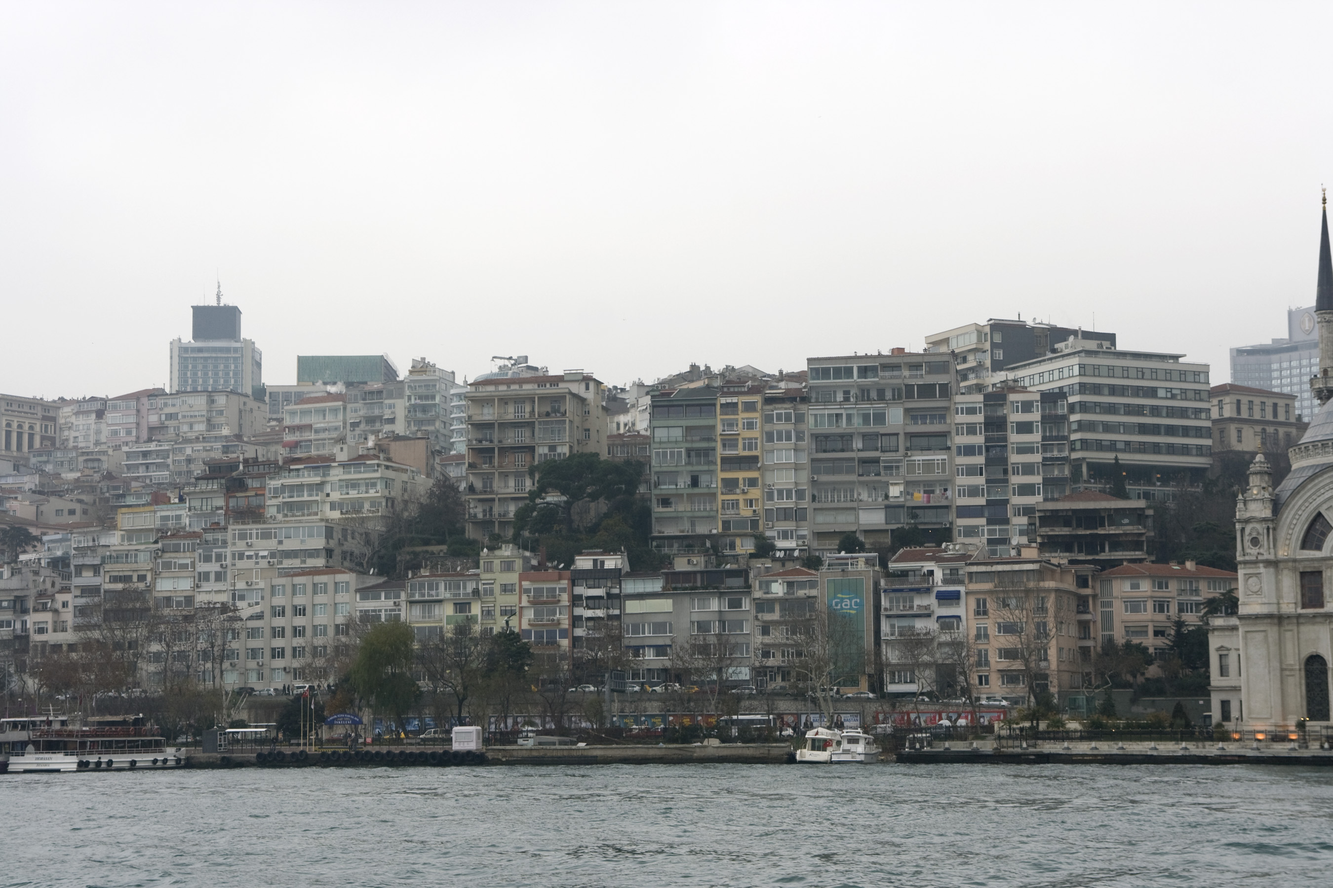 Vişnezade Mh., Meclis-i Mebusan Cd. 38 A, 34357 Beşiktaş/İstanbul, Turkey